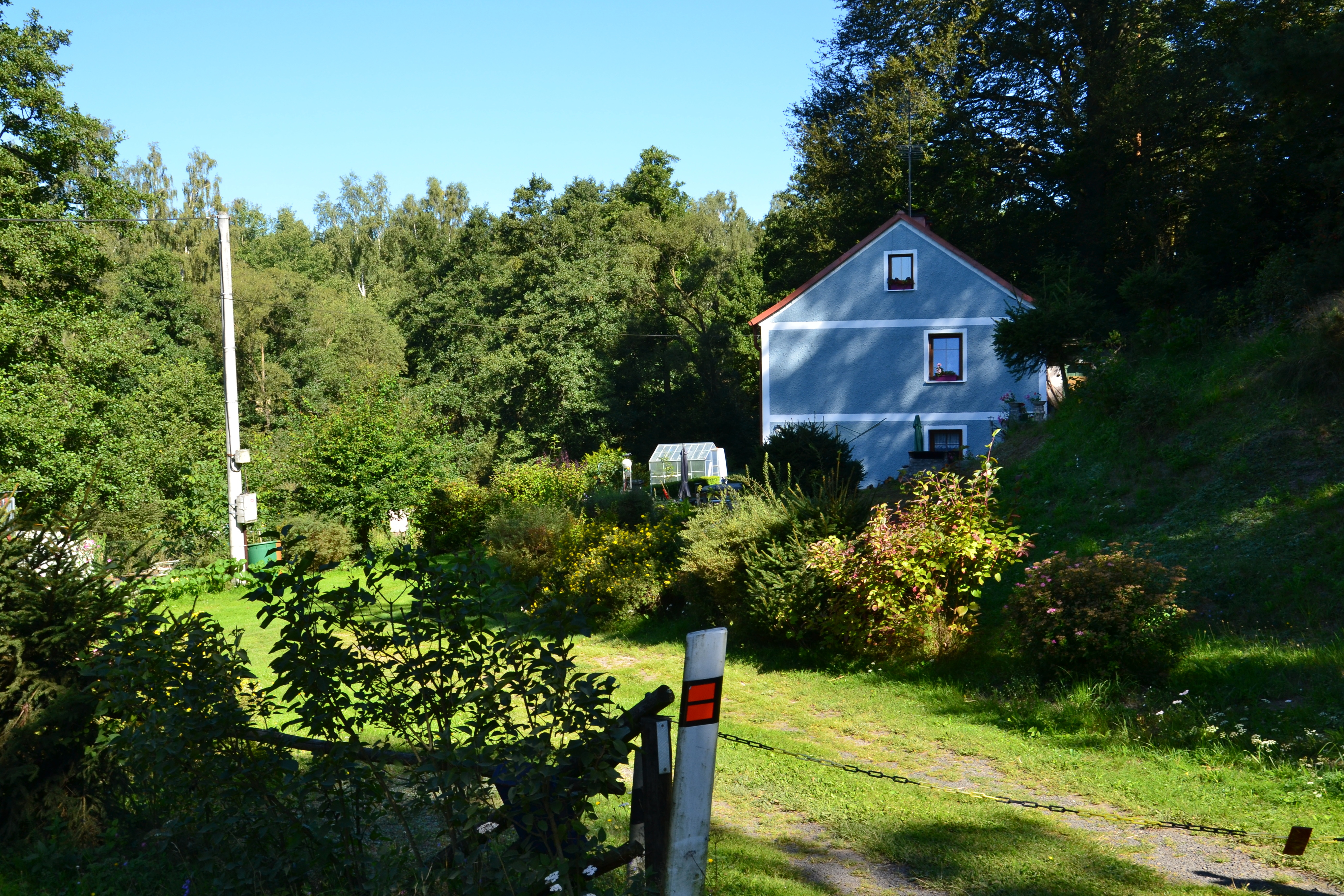 Dům čp. 4